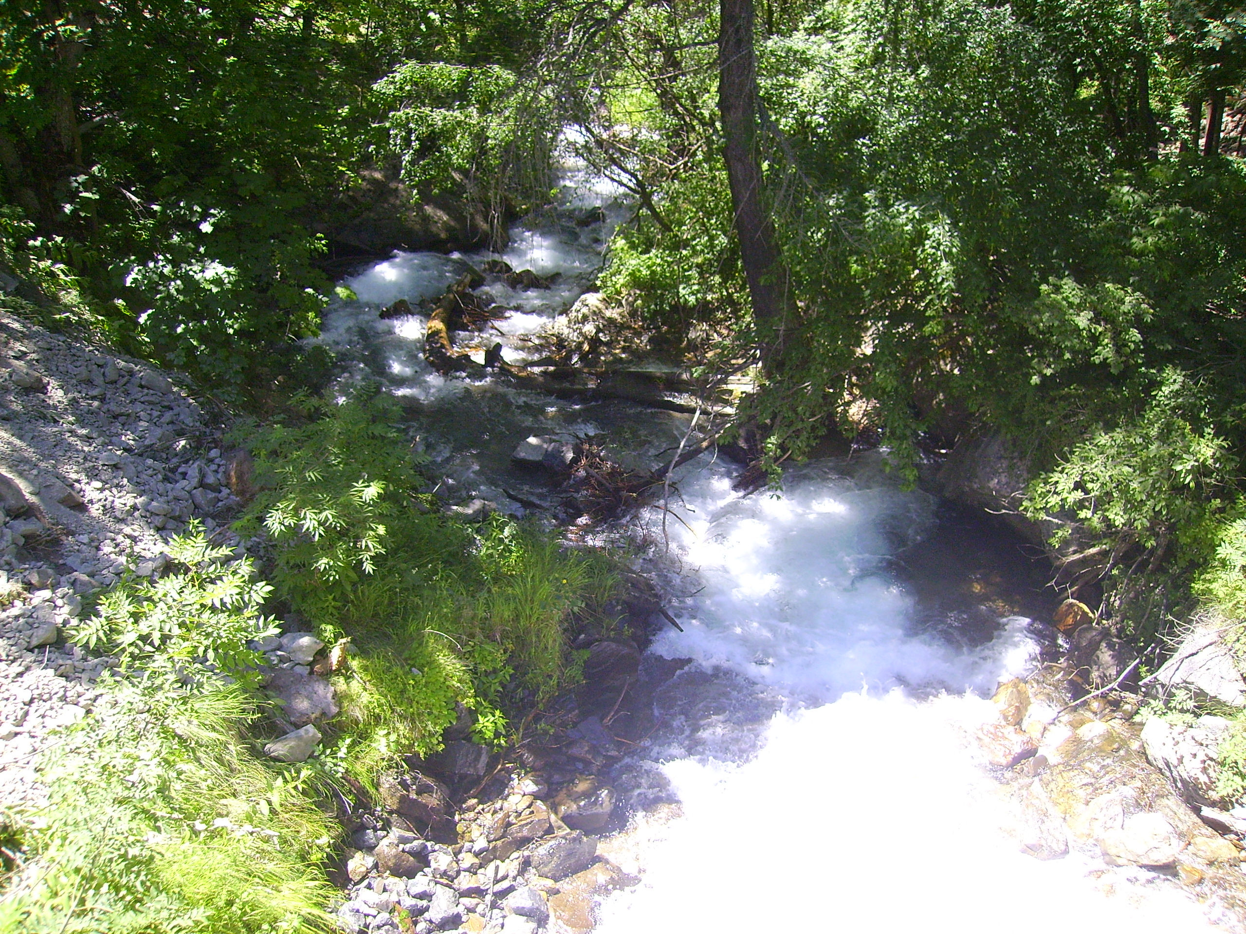 Le Torrent de Vens à St Dalmas de Selvage, vue du cour d'eau prise de la route